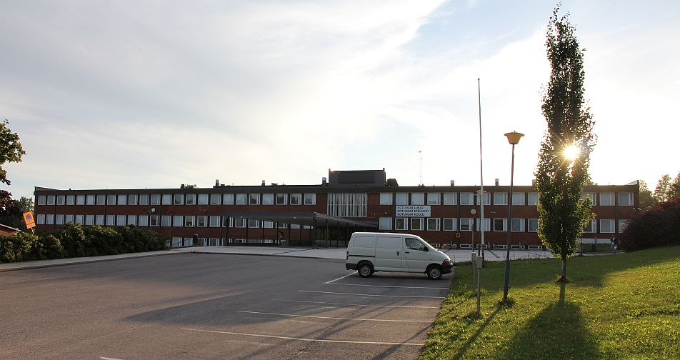 Sotungin koulun, lukion ja etälukion yhteinen rakennus. Huom: Muista säilyttää viittaus kuvaajaan, mikäli käytät kuvaa.